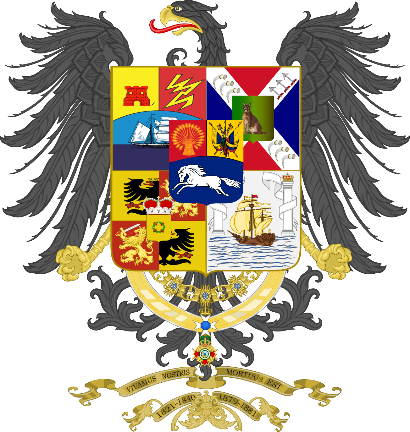 Escudo del Cementerio El Cuadrado Luxburg-Carolath